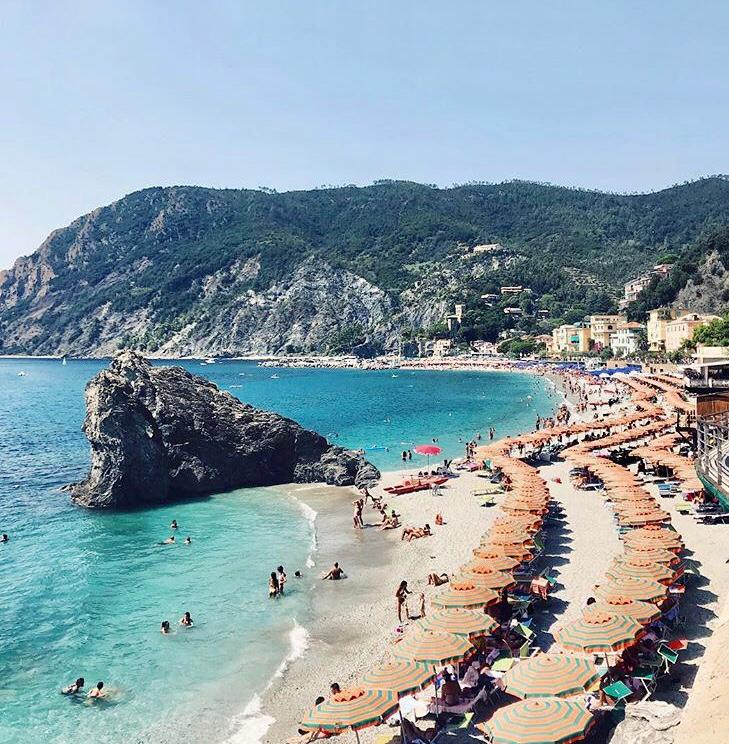 Monterosso Al Mare